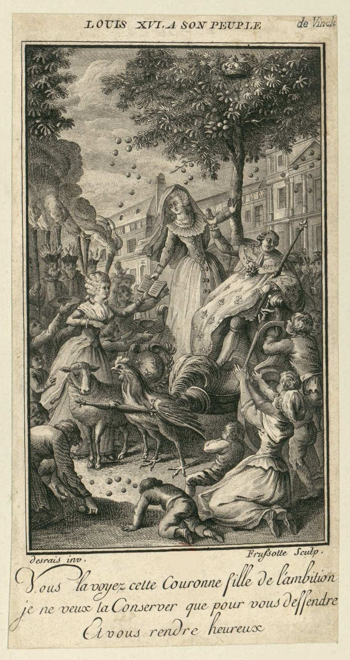 Frontispice de Remarques patriotiques pour les États généraux, d'Olympe de Gouges (15 décembre 1789). Cette allégorie figure le roi Louis XVI en grand costume de sacre, assis sur un char tiré par un coq et un mouton, tandis qu'une jeune femme (probablement Olympe de Gouges elle-même) tend une brochure à la reine Marie-Antoinette.